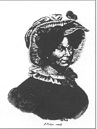 Portret van de schrijfster Anna Barbara van Meerten-Schilperoort